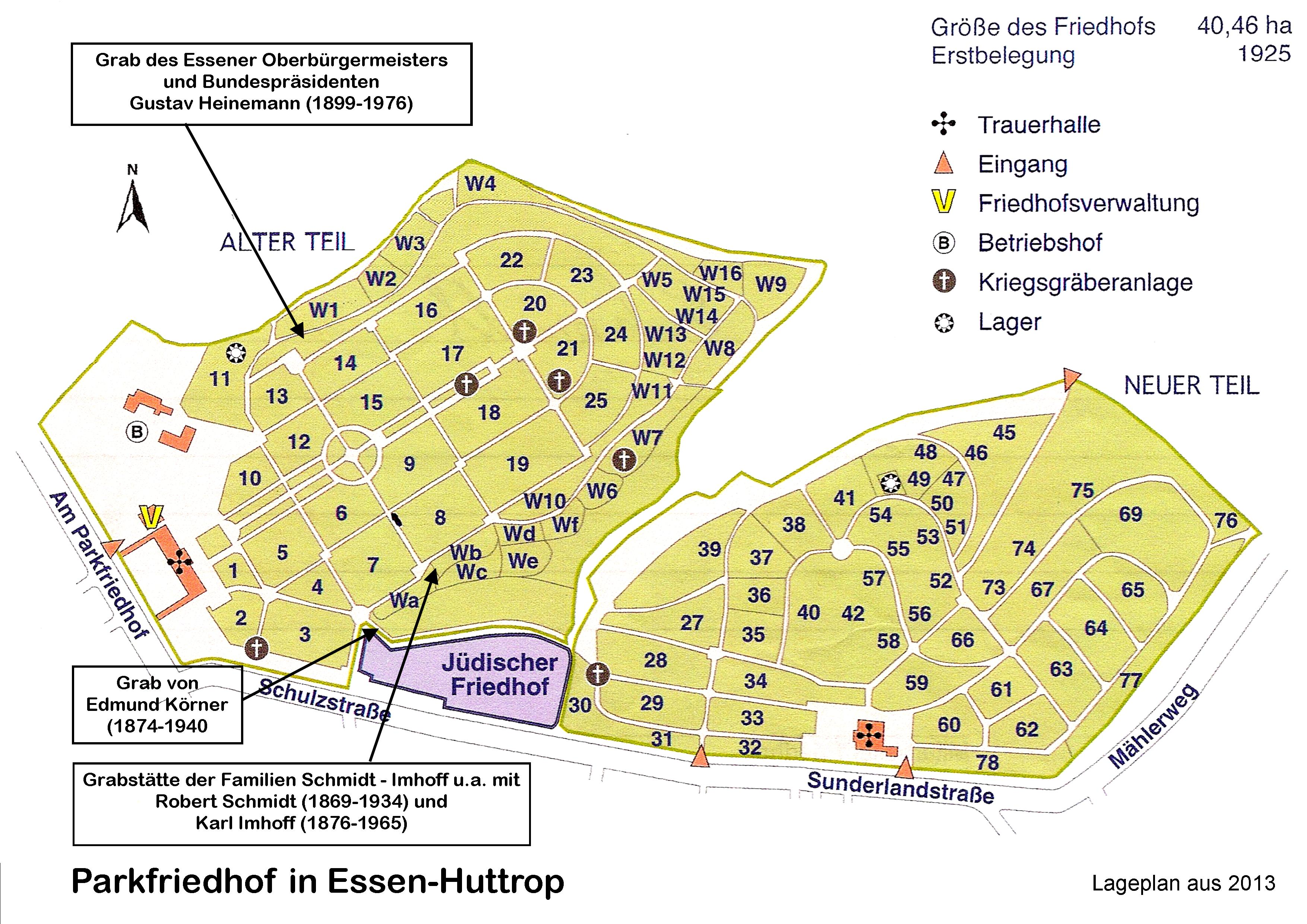 Lageplan Parkfriedhof in Essen-Huttrop mit Markierung einzelner Gräber